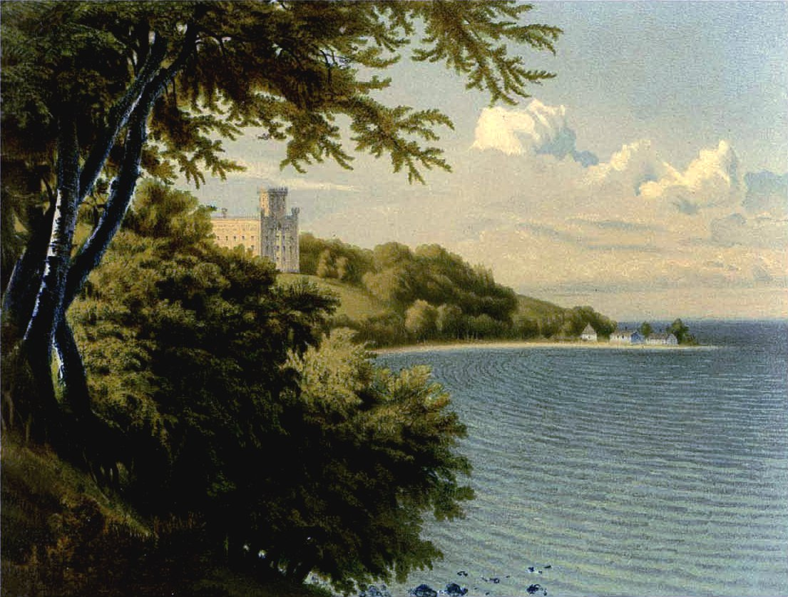 Rzucewo - zamek Schloss Rutzau, Lithografie aus dem 19. Jahrhundert